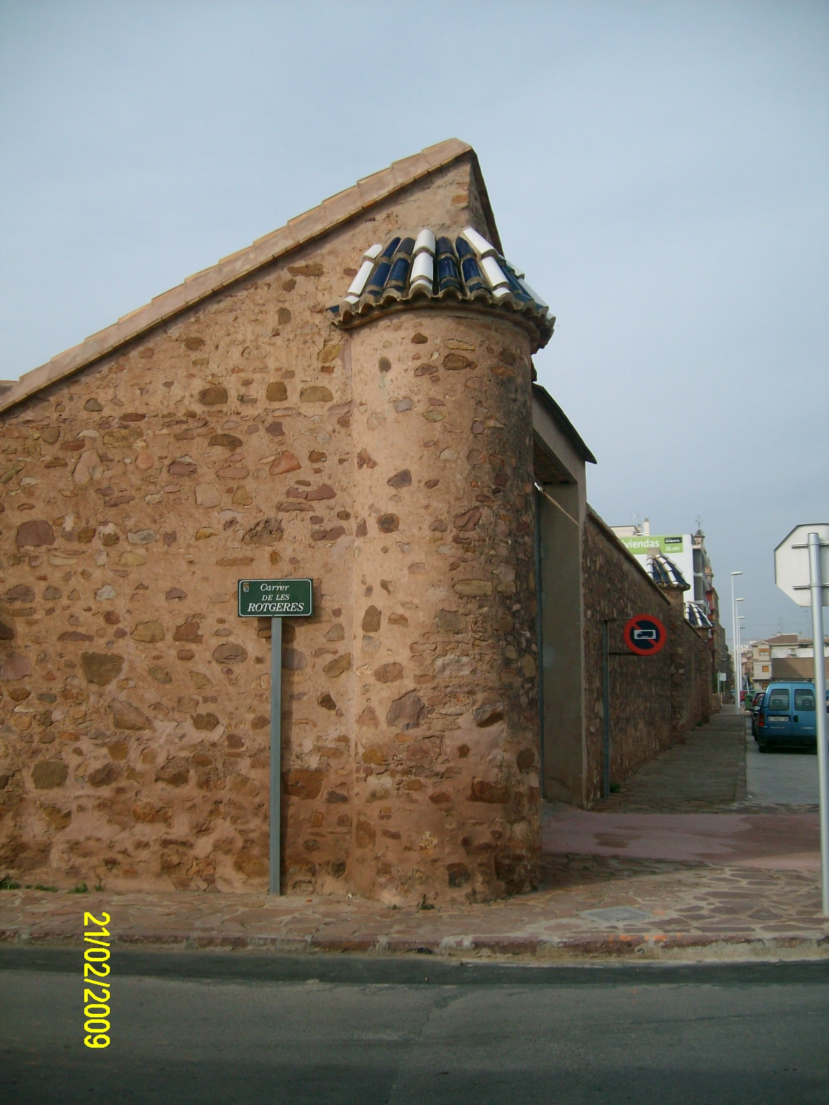 Mur del jardí Botànic al carrer de les Rotgeres